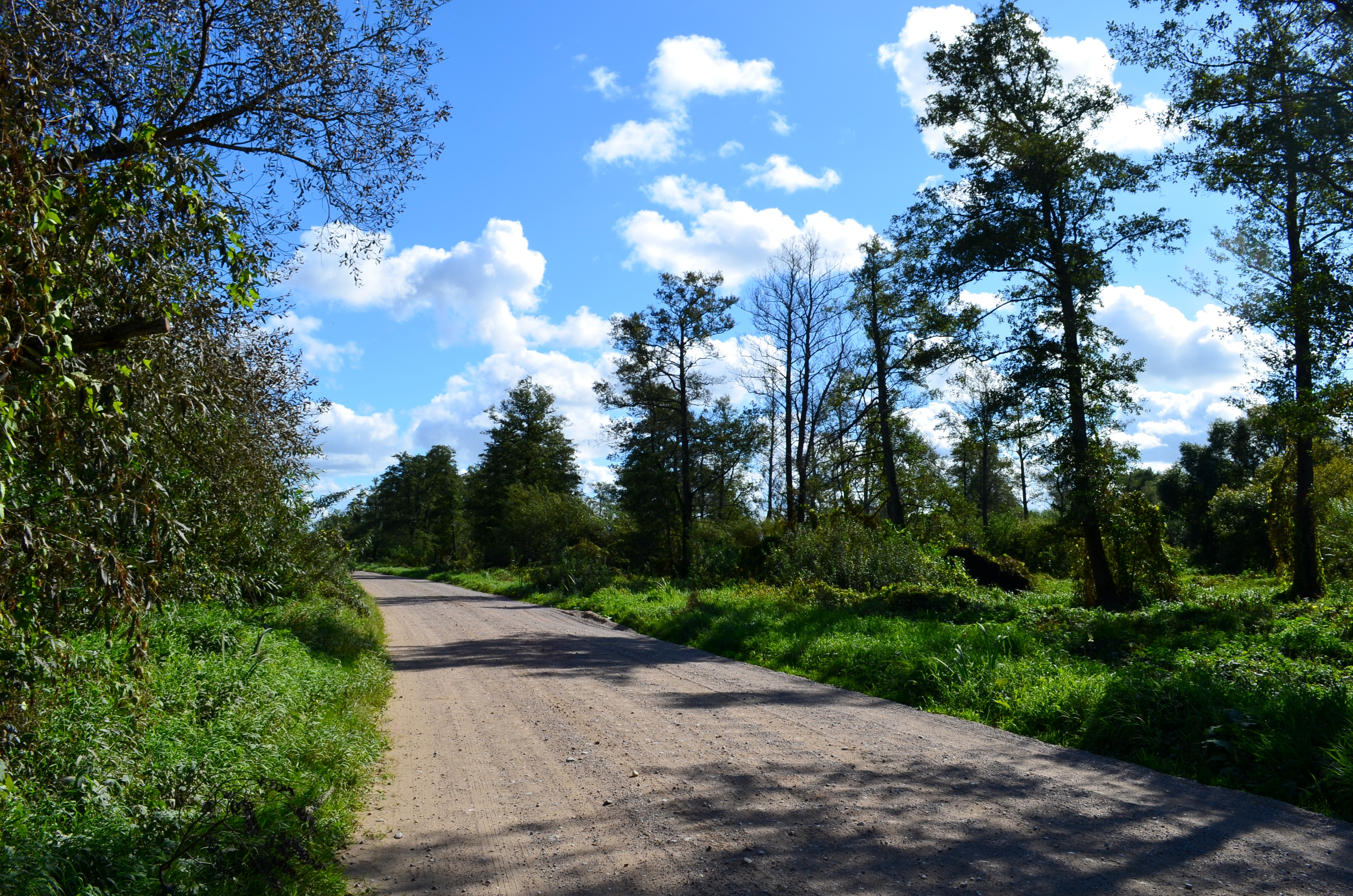 Žemaitėška: Žalgėrė medė, Šėlotės rajuons